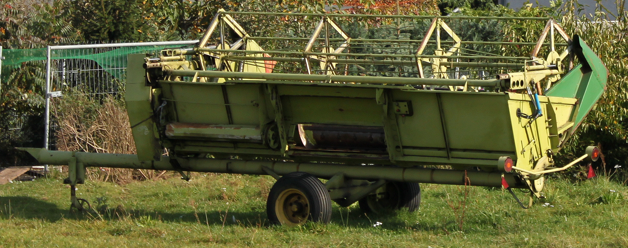 Schneidwerk des Mähdreschers E 514 in Transportstellung von hinten auf einem Schneidwerkwagen